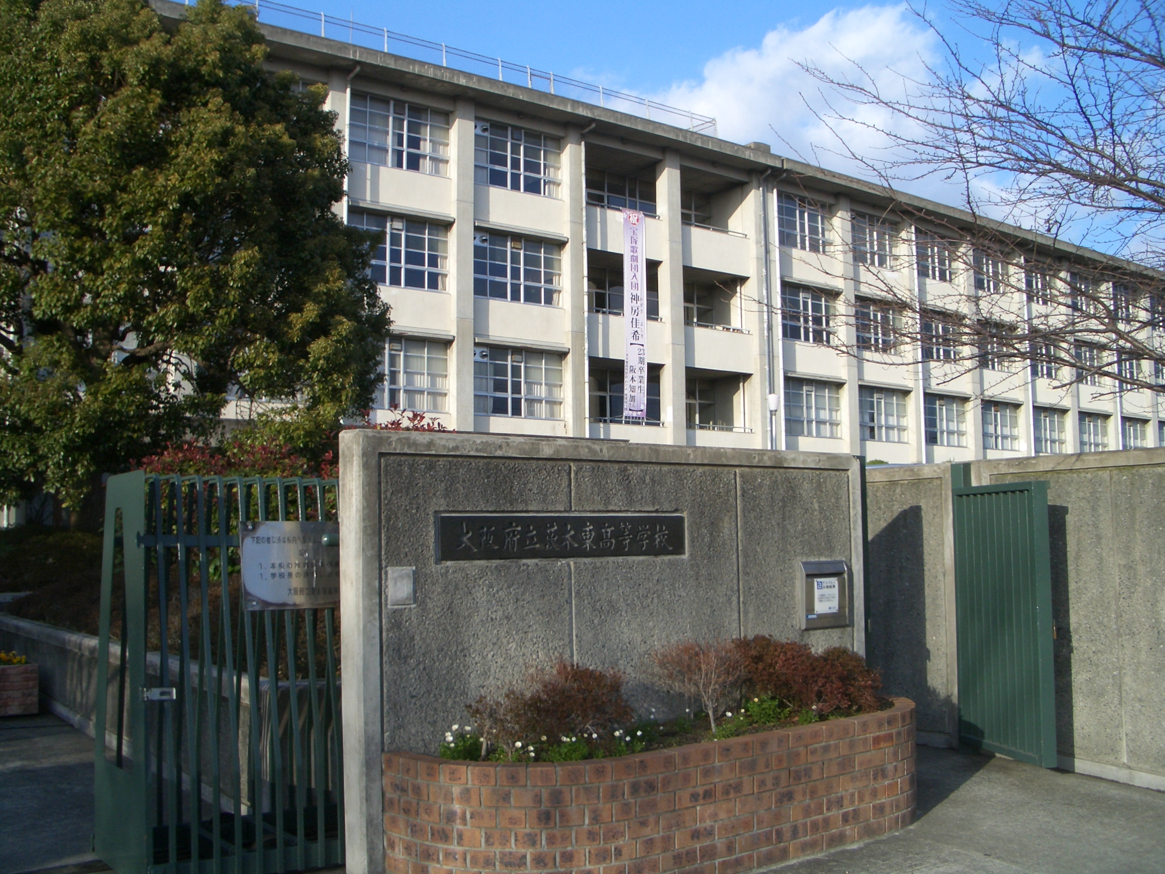 Ibarakihigashi High School,Tamashimadai Ibaraki-City Osaka Japan.